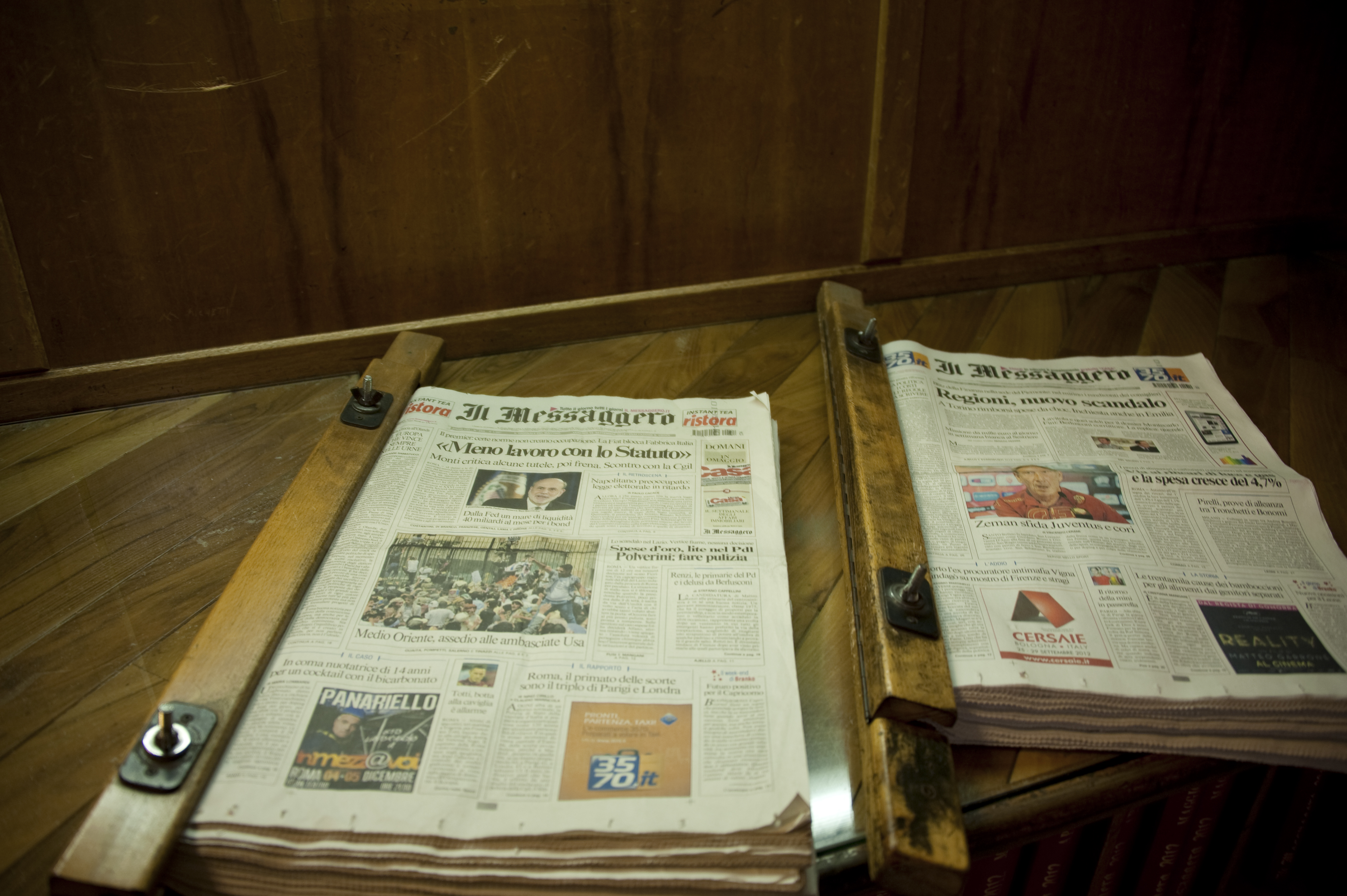 Quotidiani in lettura al alazzo di via del Tritone (Roma, Italia)